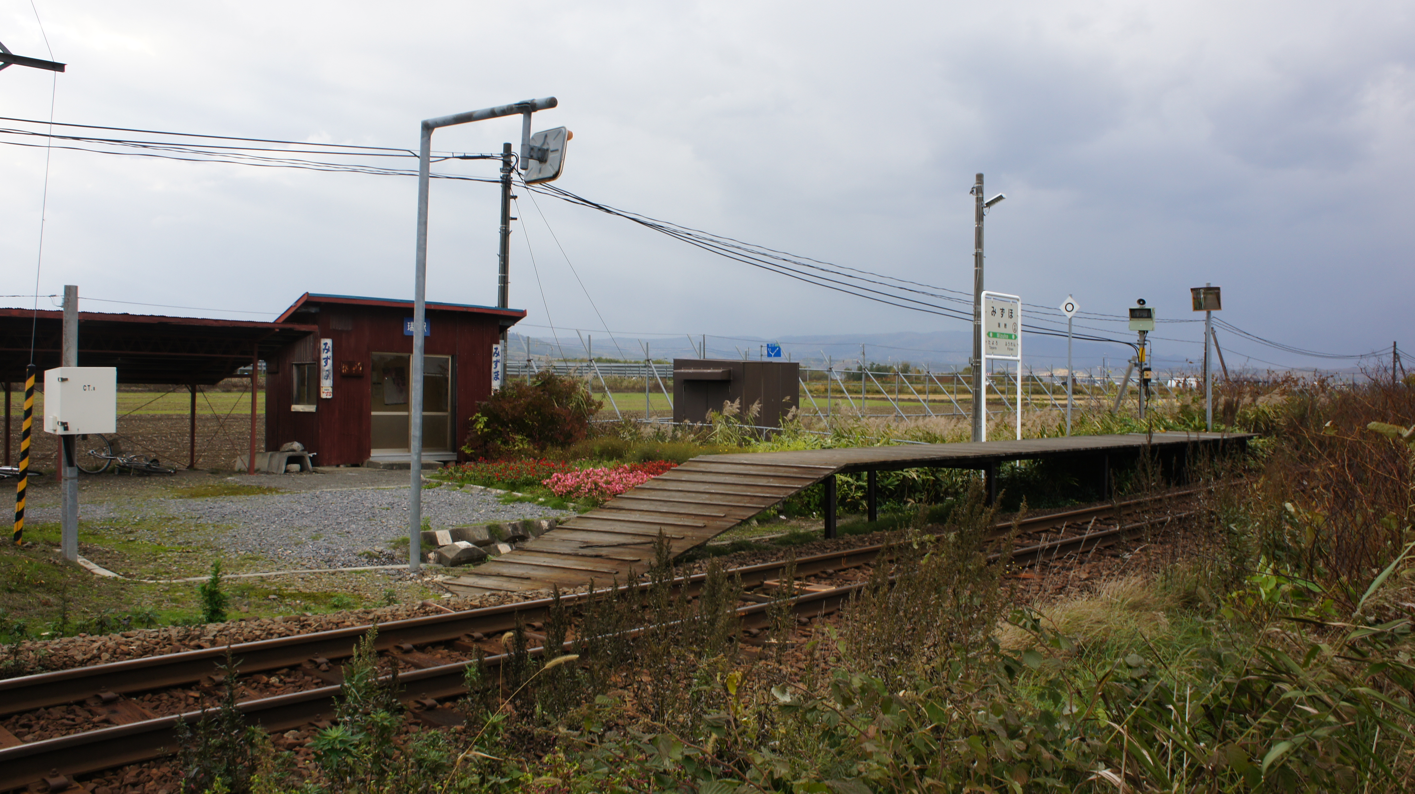 JR宗谷本線・瑞穂駅全景 Sony NEX-3